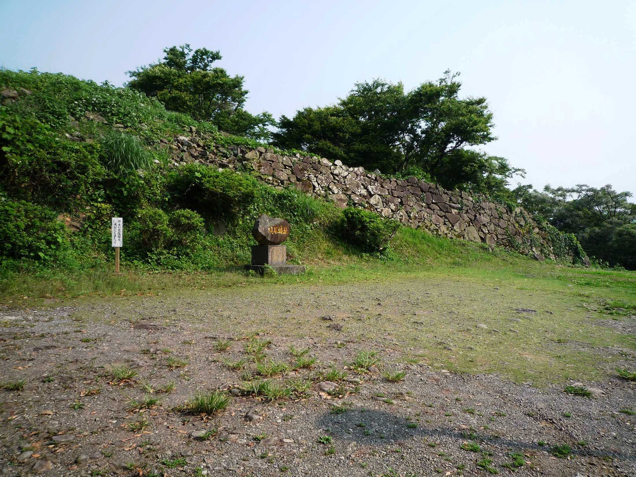 梶谷城跡（長崎県松浦市）